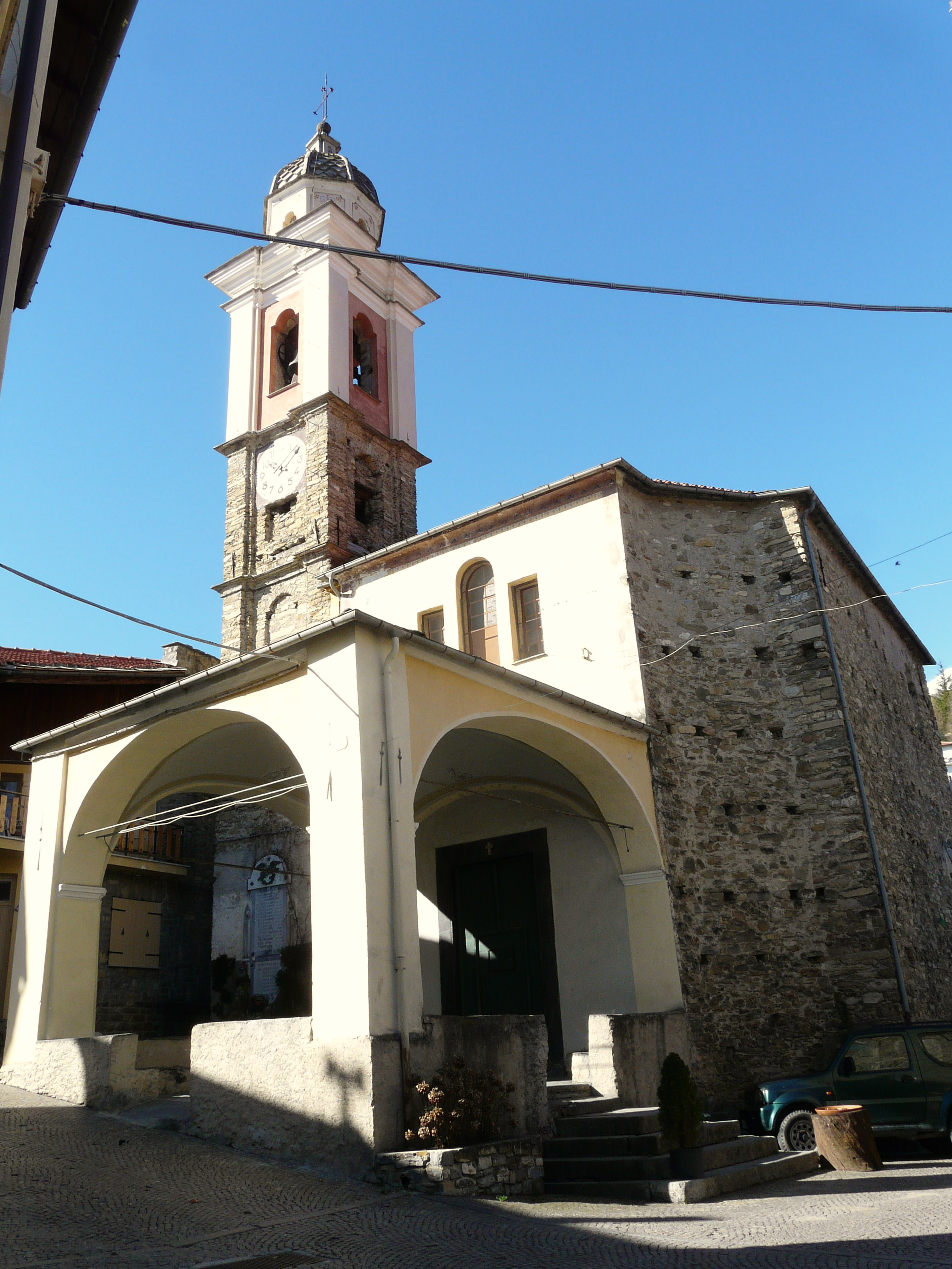 Chiesa di San Biagio, Montegrosso Pian Latte, Liguria, Italia